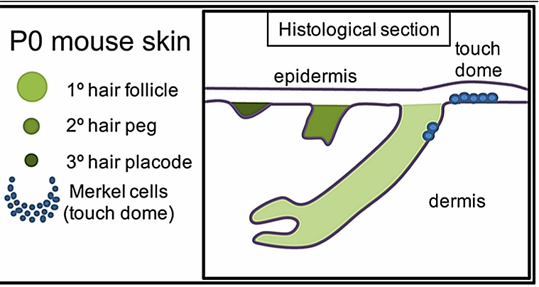 Fig 1. Se requiere β-catenina dérmica para la formación de TD MC. (A) Diagrama esquemático de la piel del ratón P0 que ilustra la relación de las MC TD con los folículos pilosos primarios, vistos en la cara desde arriba de la superficie de la piel y en la sección parasagital de la piel del tronco dorsal. Barras de escala= 50 μm.